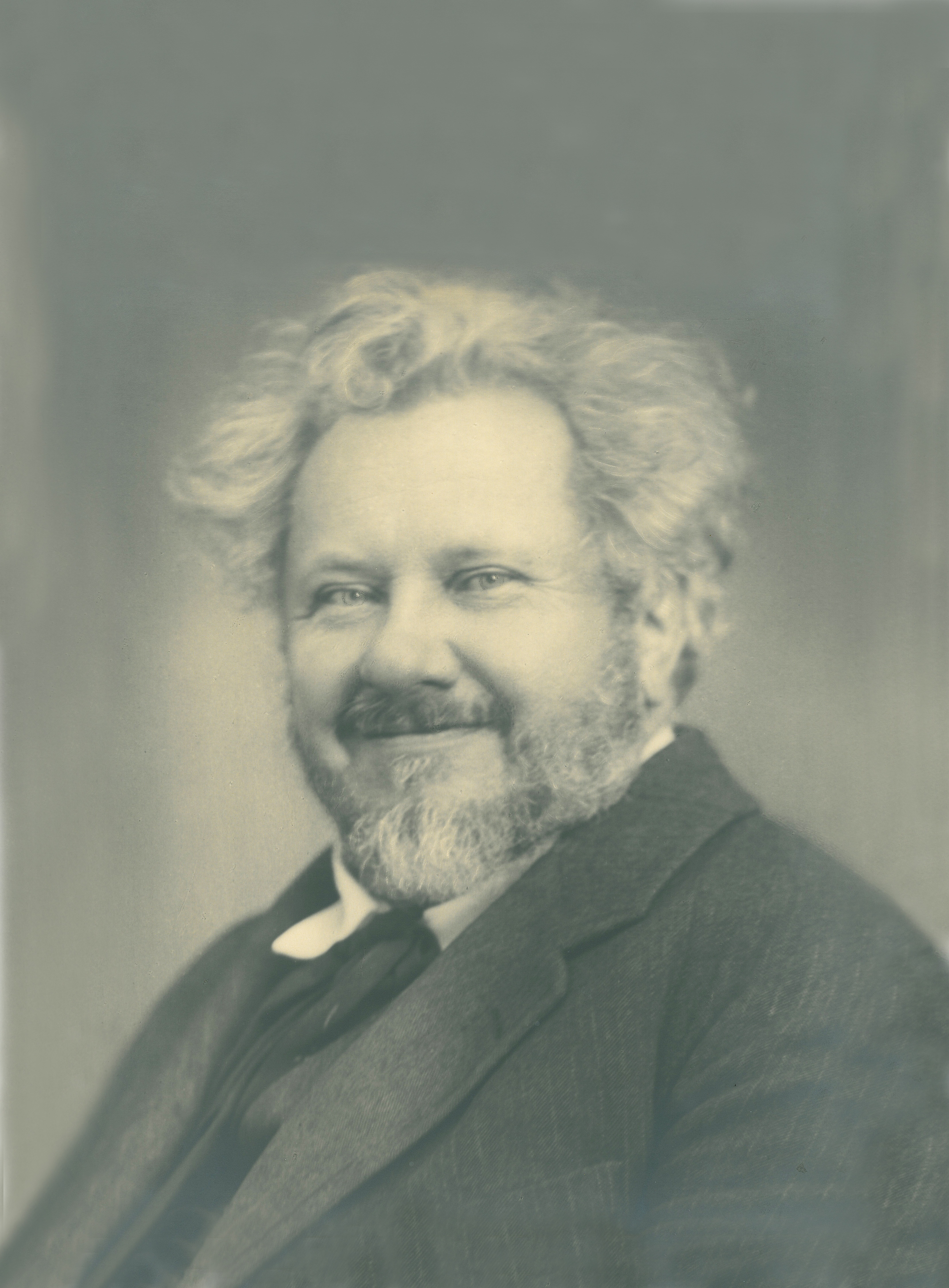 Portraitfoto von Franz Zelezny, ca. um 1920.